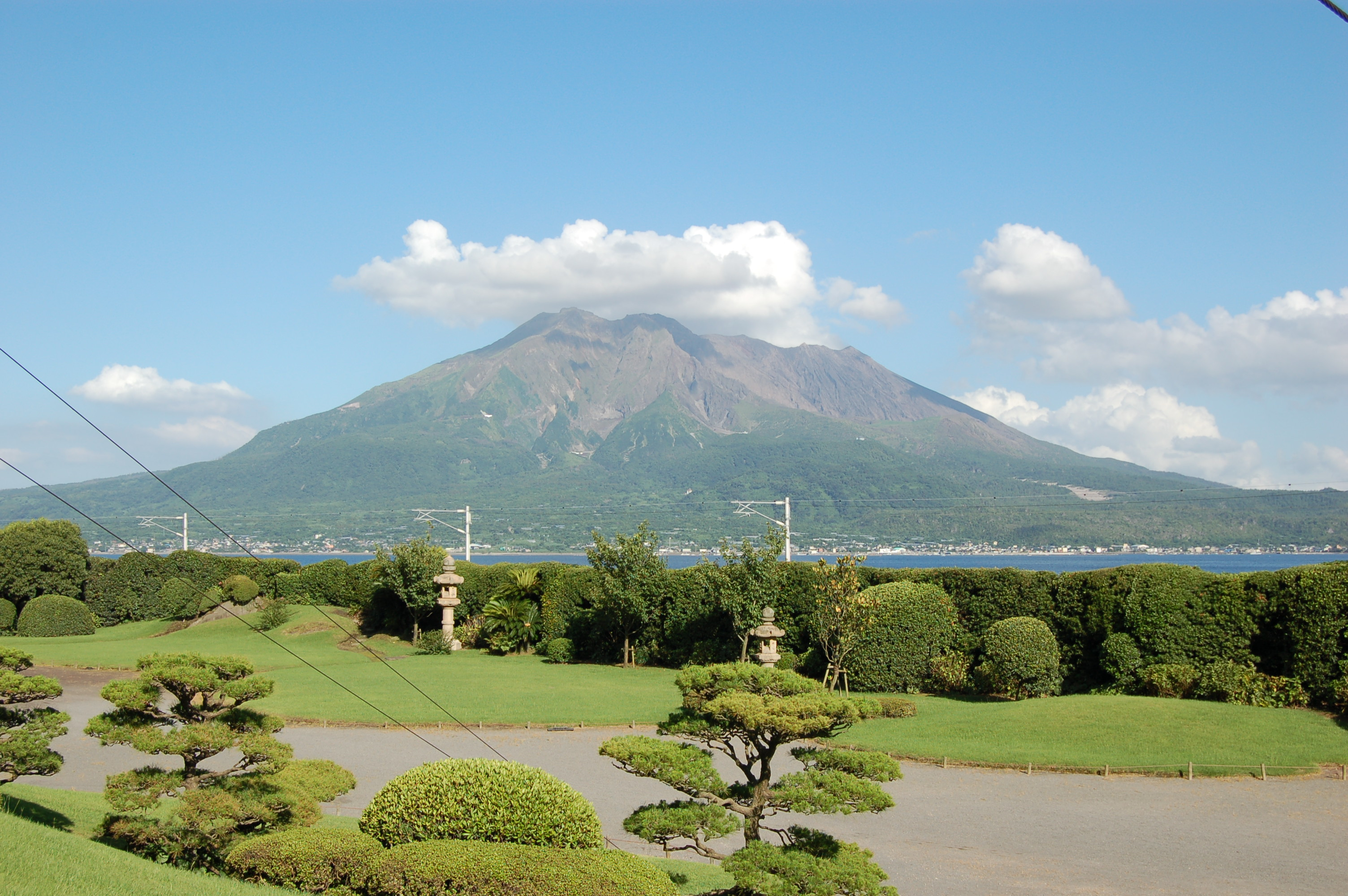 仙巌園（磯庭園）から見た桜島